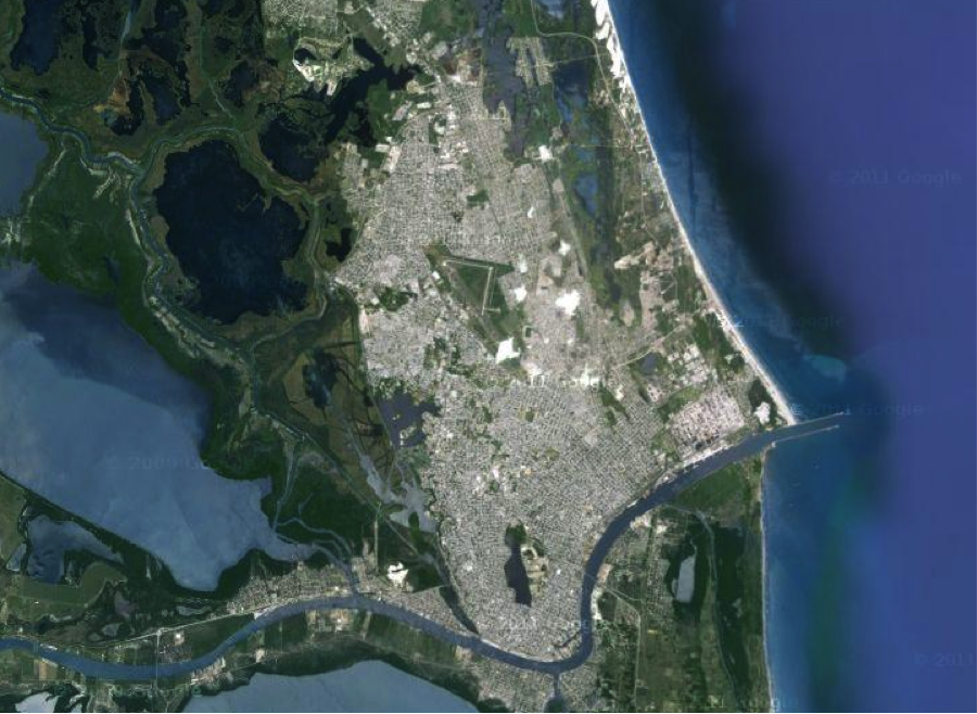 Tampico metropolitan area